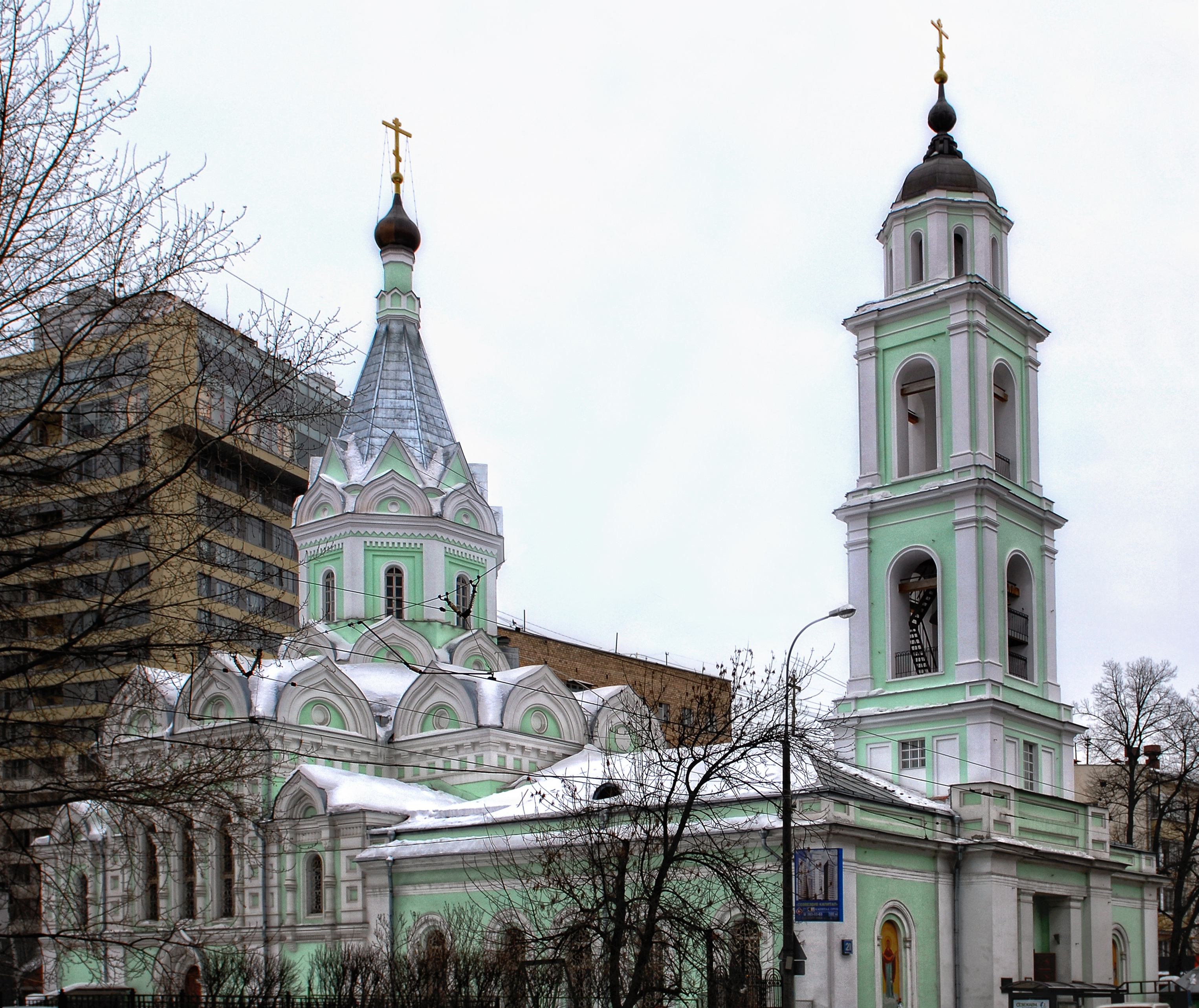 Храм Троицы Живоначальной на Шаболовке